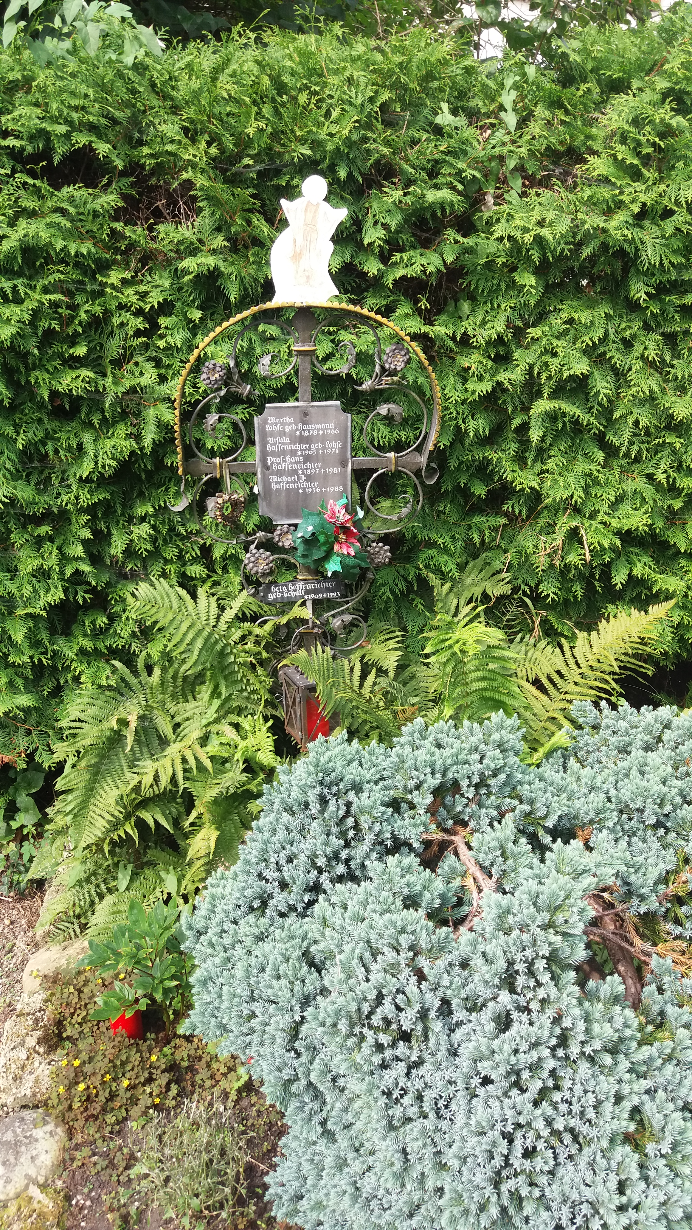 Grabstätte Hans Haffenrichter auf dem Inselfriedhof Frauenchiemsee